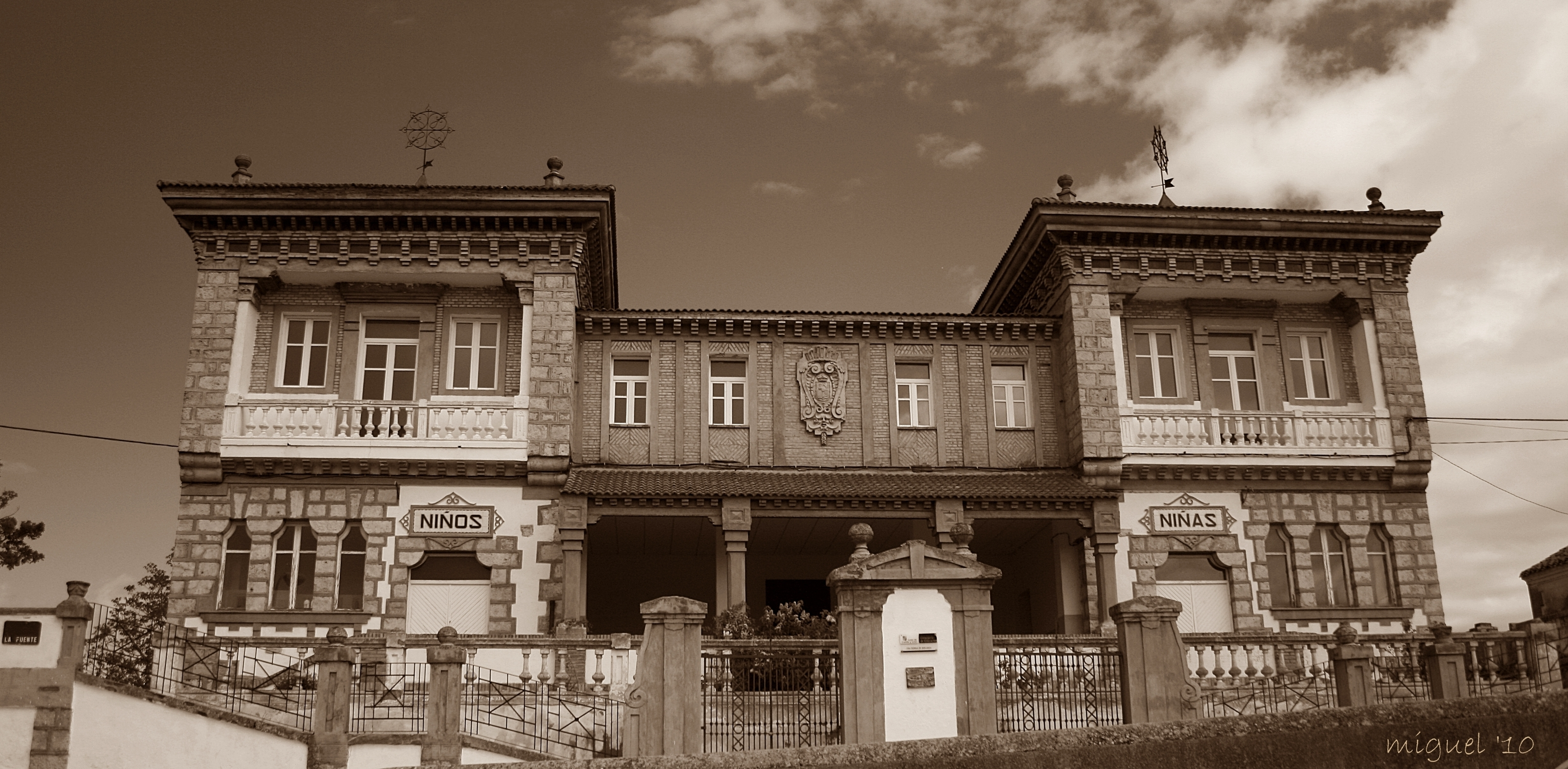 Escuelas de Quintanas de Gormaz, Soria, España.